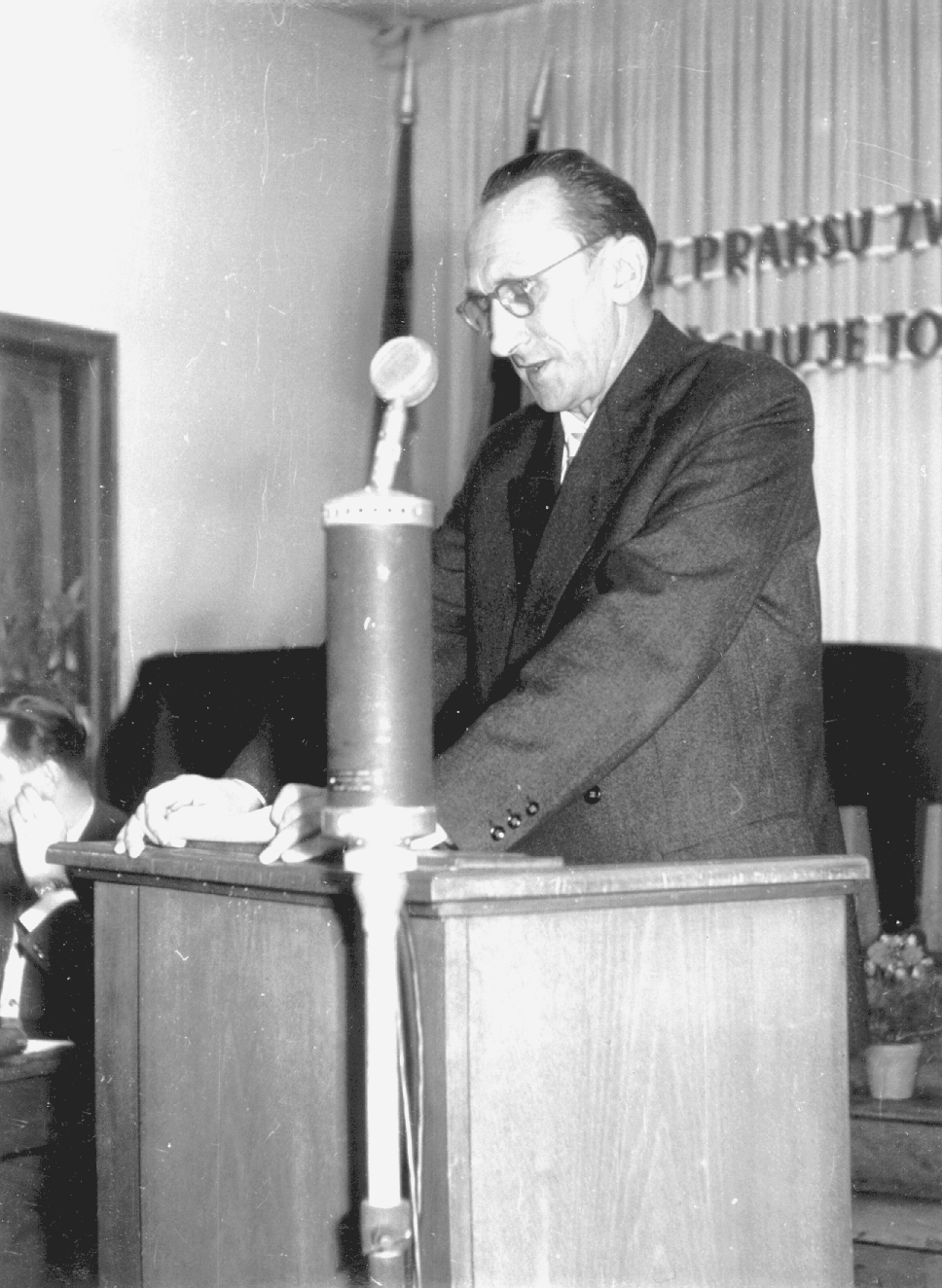 Rudolf Jenč (1903–1979)